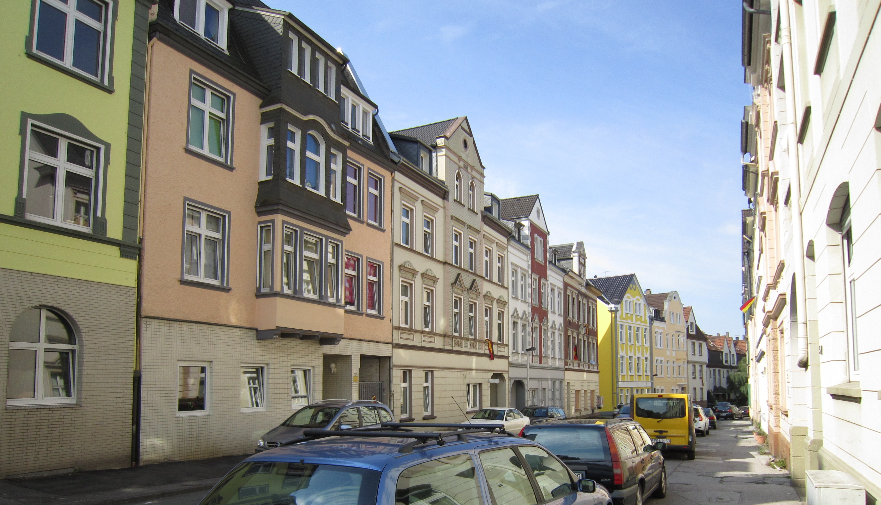 Neustraße in Solingen-Höhscheid, Wohnhäuser der Gründerzeit, aufgenommen im Sommer 2014